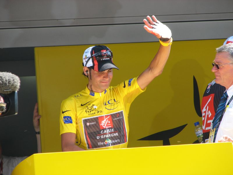 Óscar Pereiro vestido de amarelo